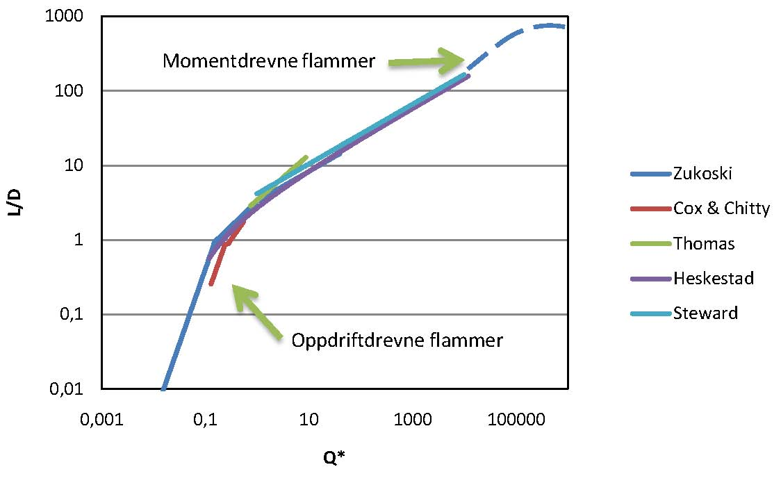 Energiproduksjon vs. flammehøyde